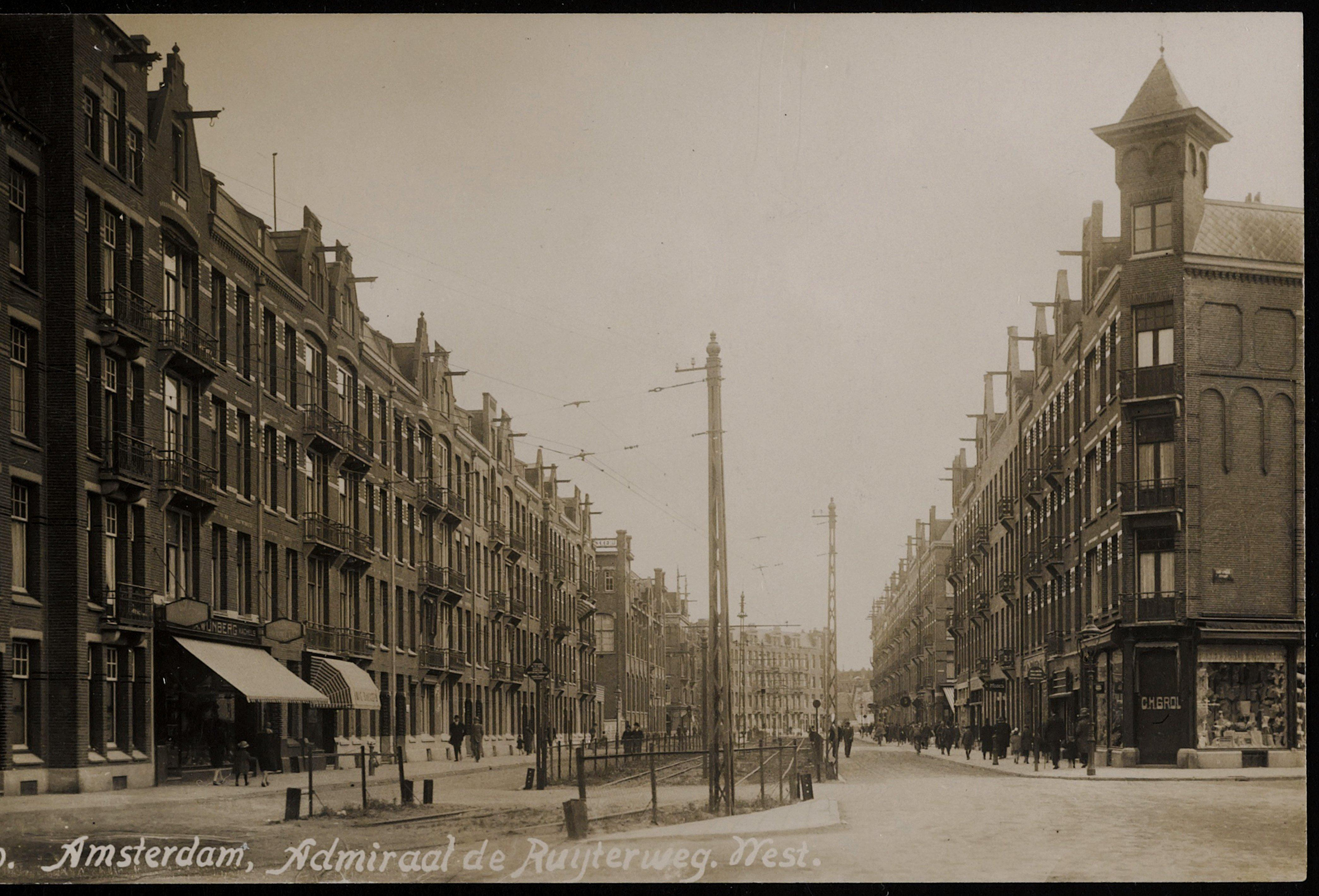 Beschrijving Admiraal de Ruijterweg Gezien in oostelijke richting, rechts de Van Speijkstraat. Met trambaan van de Haarlemse tram. Documenttype prentbriefkaart Vervaardiger Onbekend Anoniem Collectie Collectie Stadsarchief Amsterdam: prentbriefkaarten Datering 1926 Geografische naam Admiraal De Ruijterweg Inventarissen Afbeeldingsbestand PRKBB00008000003